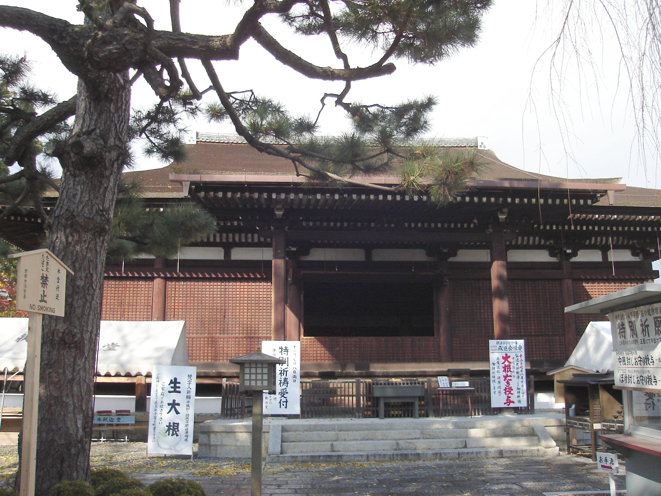 投稿者撮影 2005/12/03 大報恩寺 本堂